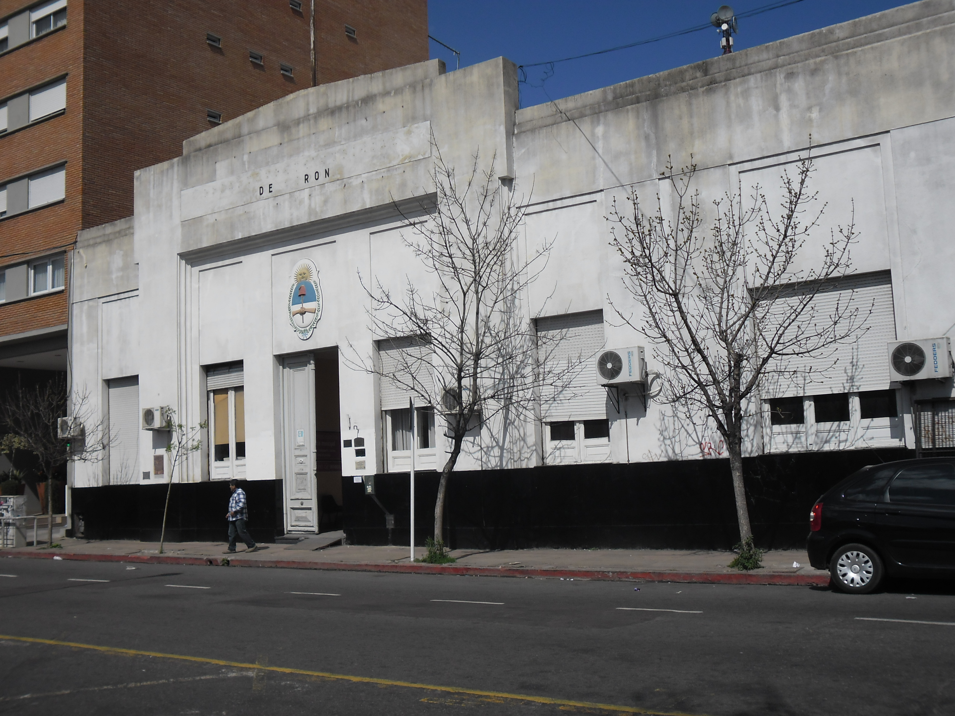 Hoy sede de la Dirección municipal de Acción social, tiene frente sobre la calle Buen Viaje, cuyo nombre hace referencia a las narrativas, casi míticas, de la fundación de la localidad.